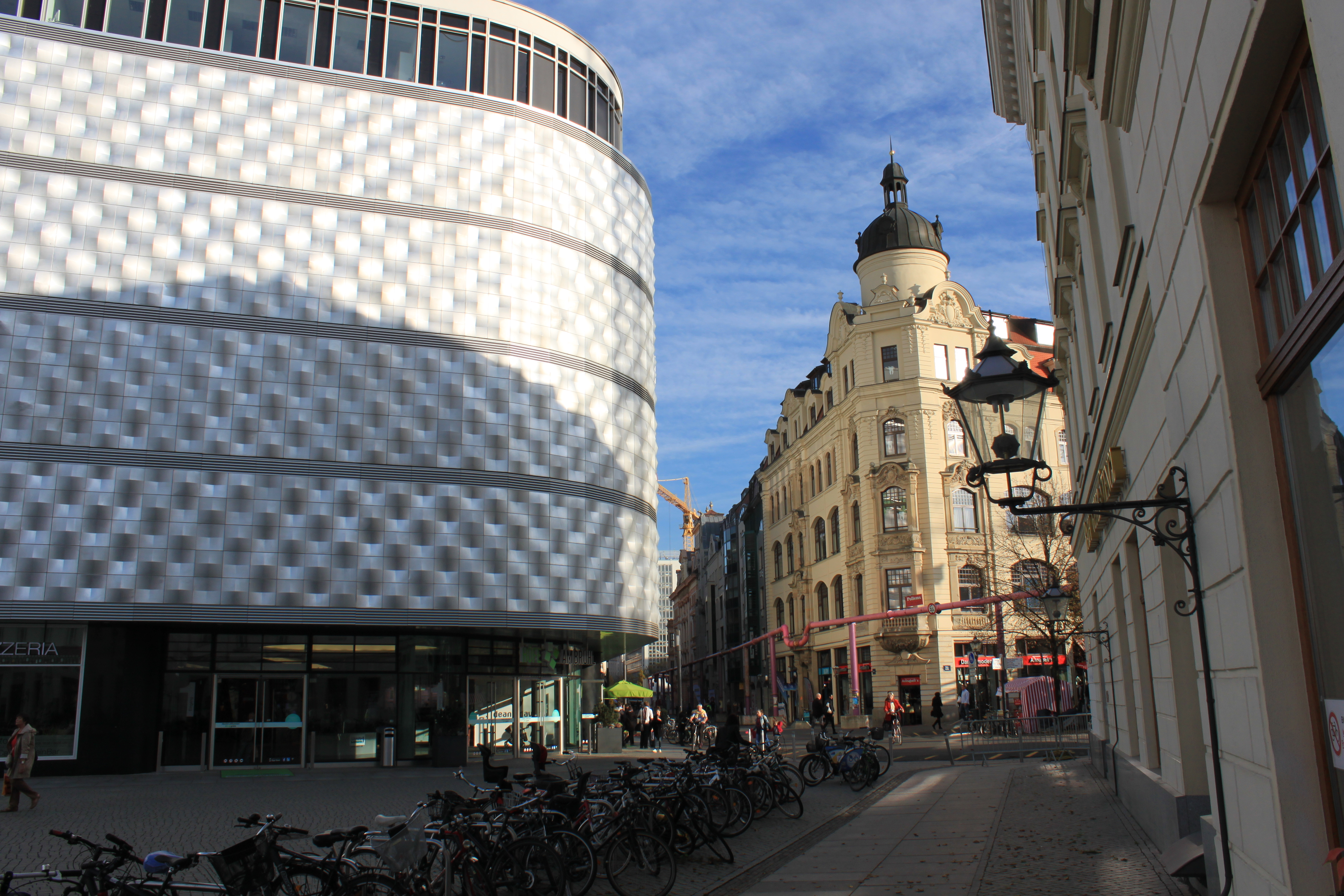 Brühl in Leipzig